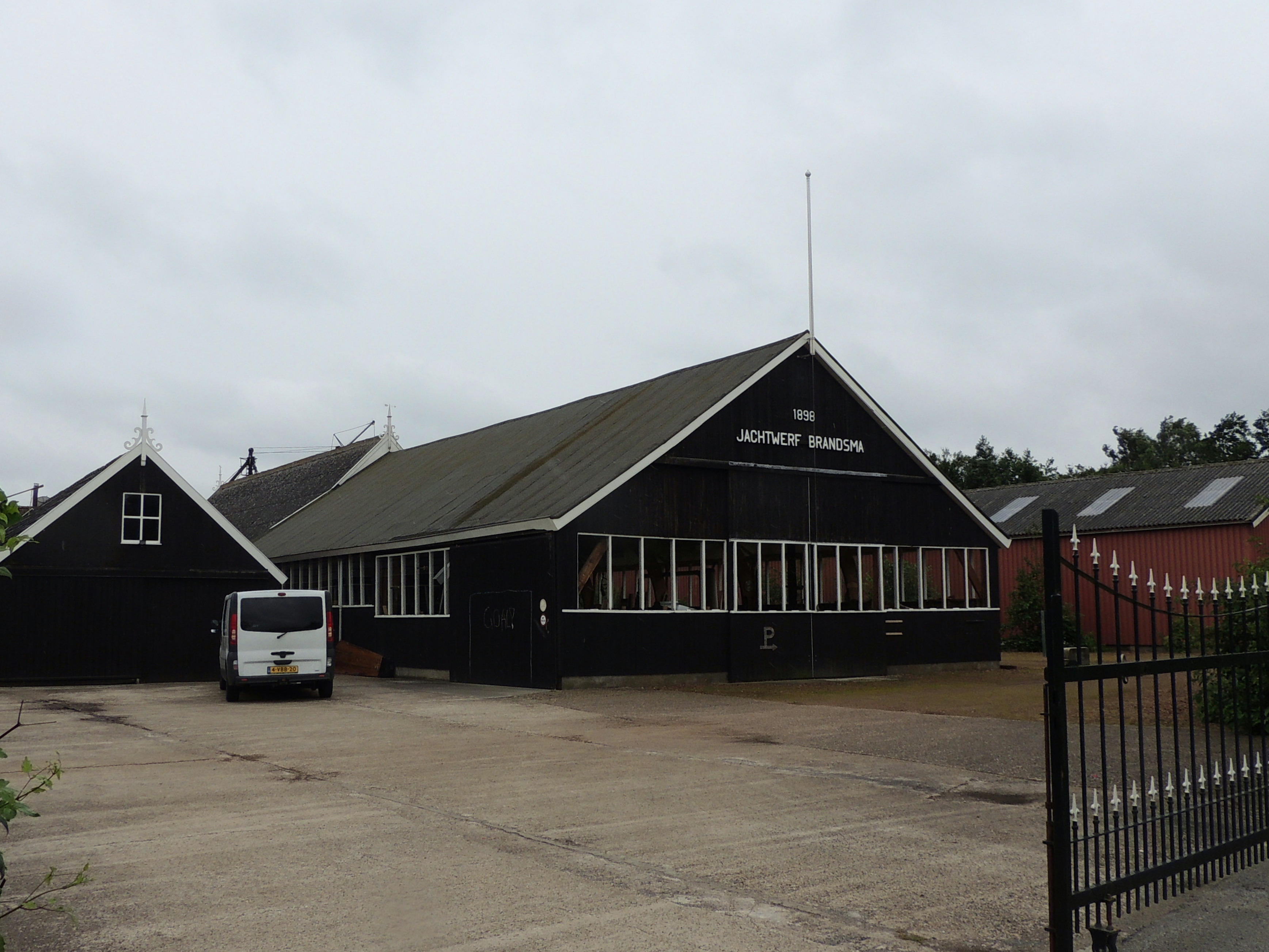 Jachtwerf Brandsma 1898